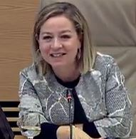 Ana Oramas, présidente de la commission d'investigation sur la crise financière, en décembre 2017.